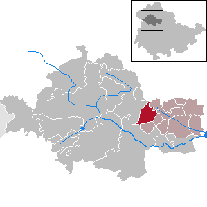 Kirchheilingen in Thuringia - Unstrut-Hainich-Kreis